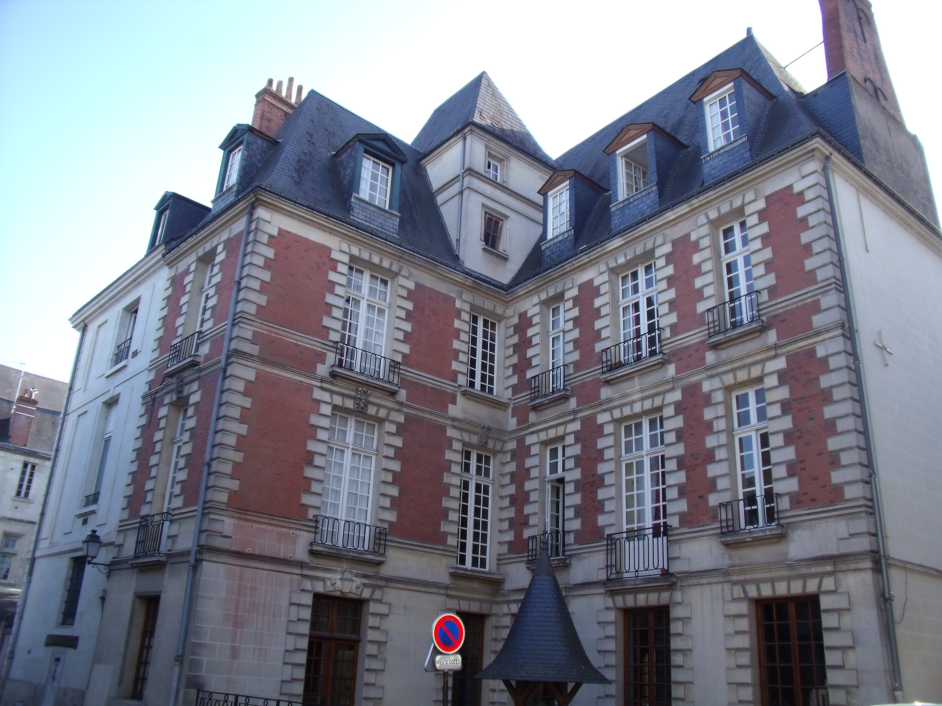 Vieux tours, premier hôtel restauré 1954 , 3 rue Paul Louis Courrier